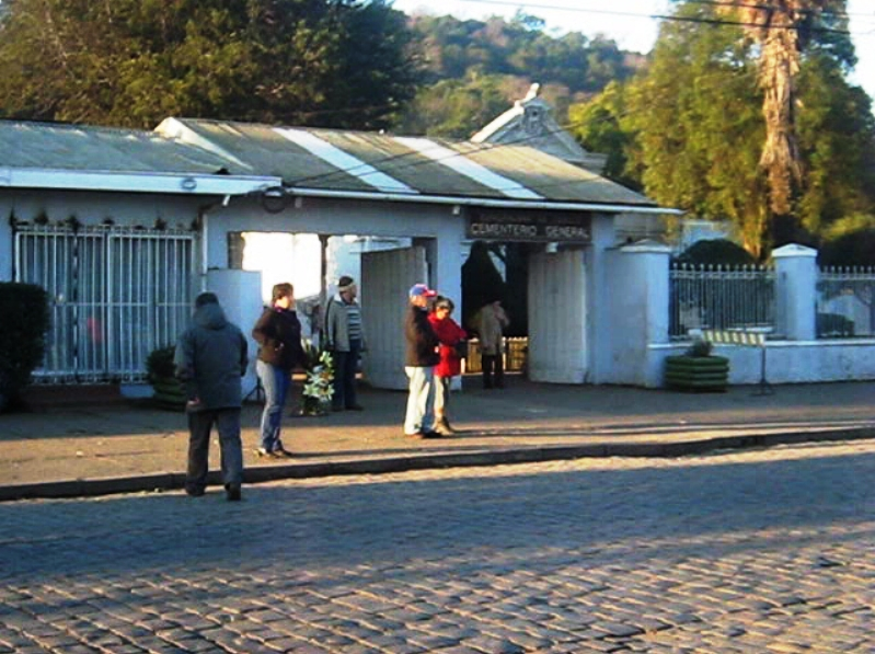 Acceso al Cementerio General de la ciudad de Temuco, Chile, en avenida Balmaceda 143.